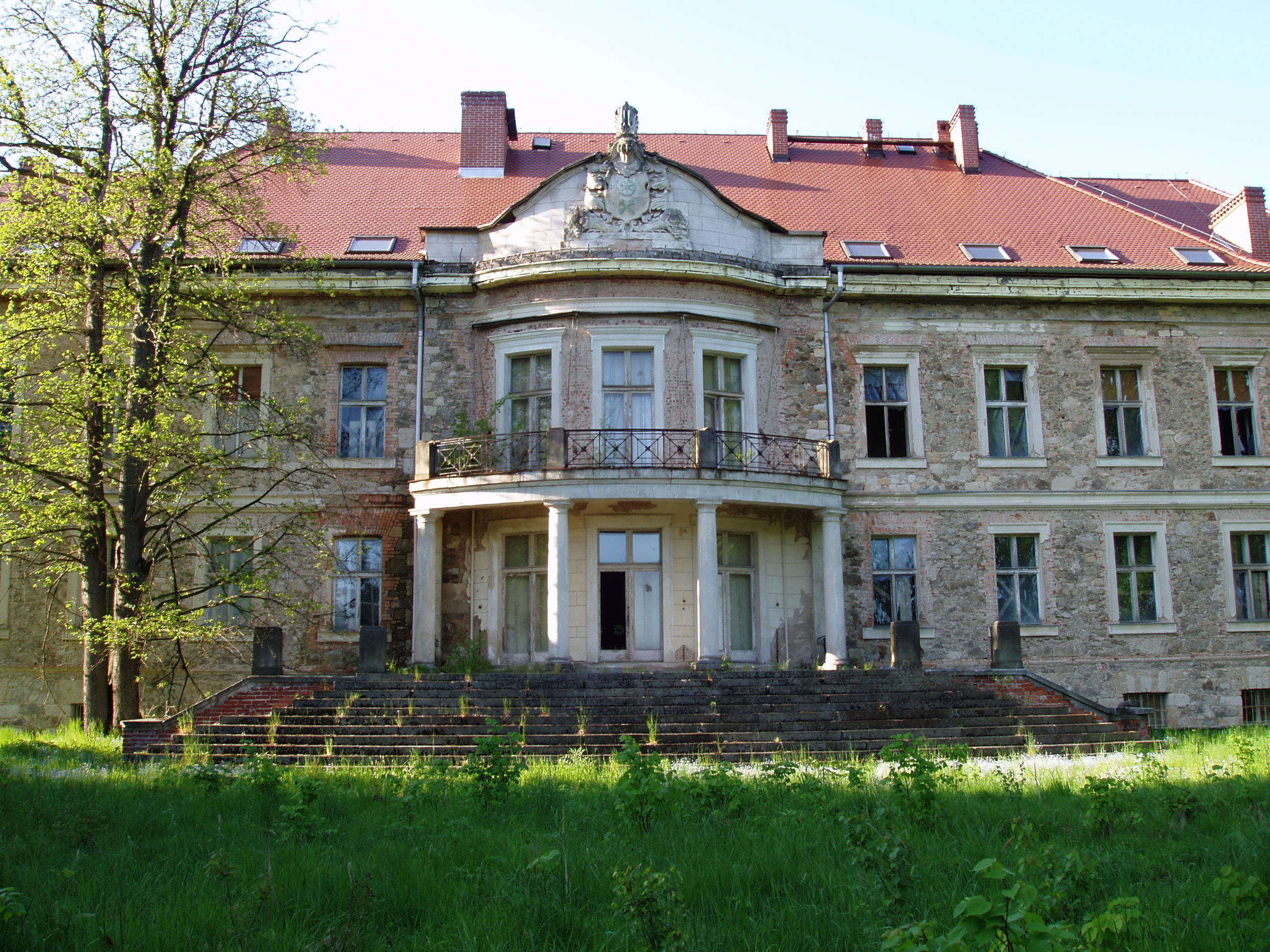 Maciejowiec, pałac, 1834-1838, 1914